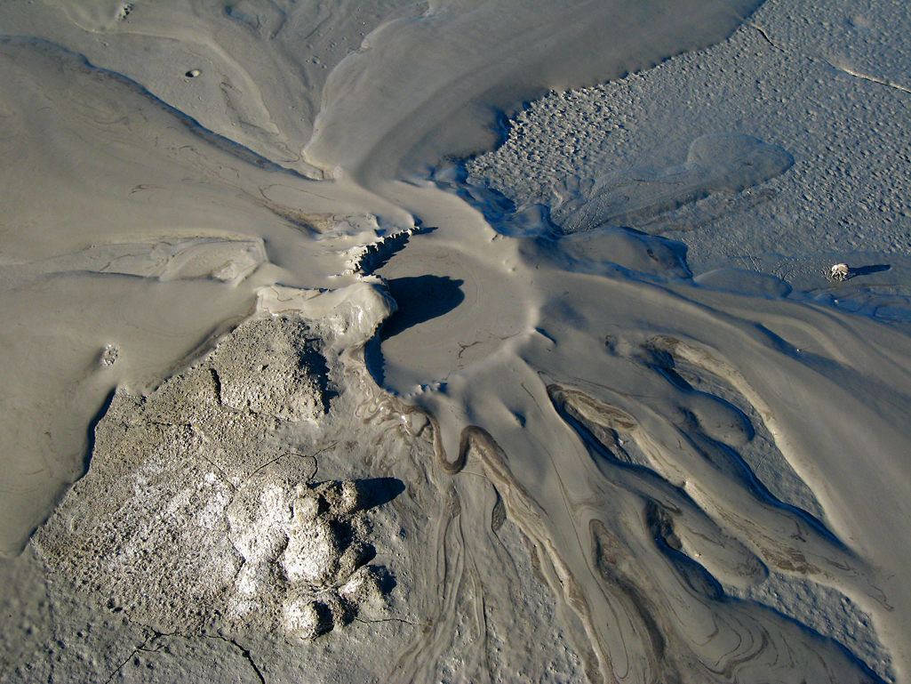 Vulcanelli di Macalube near Aragona in Sicily